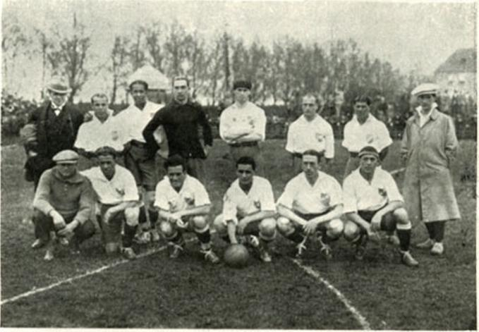 El equipo de Nacional que venció por 7:0 a la selección de Holanda en Rotterdam. Nacional: Clavijo; Fiorentino, Bucetta; Carreras, Zibechi, Andrade; Urdinarán, Scarone, Castro, Casanello, Romano.